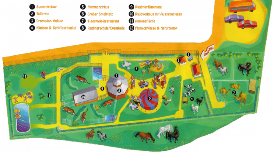 Plan des Tigerparks